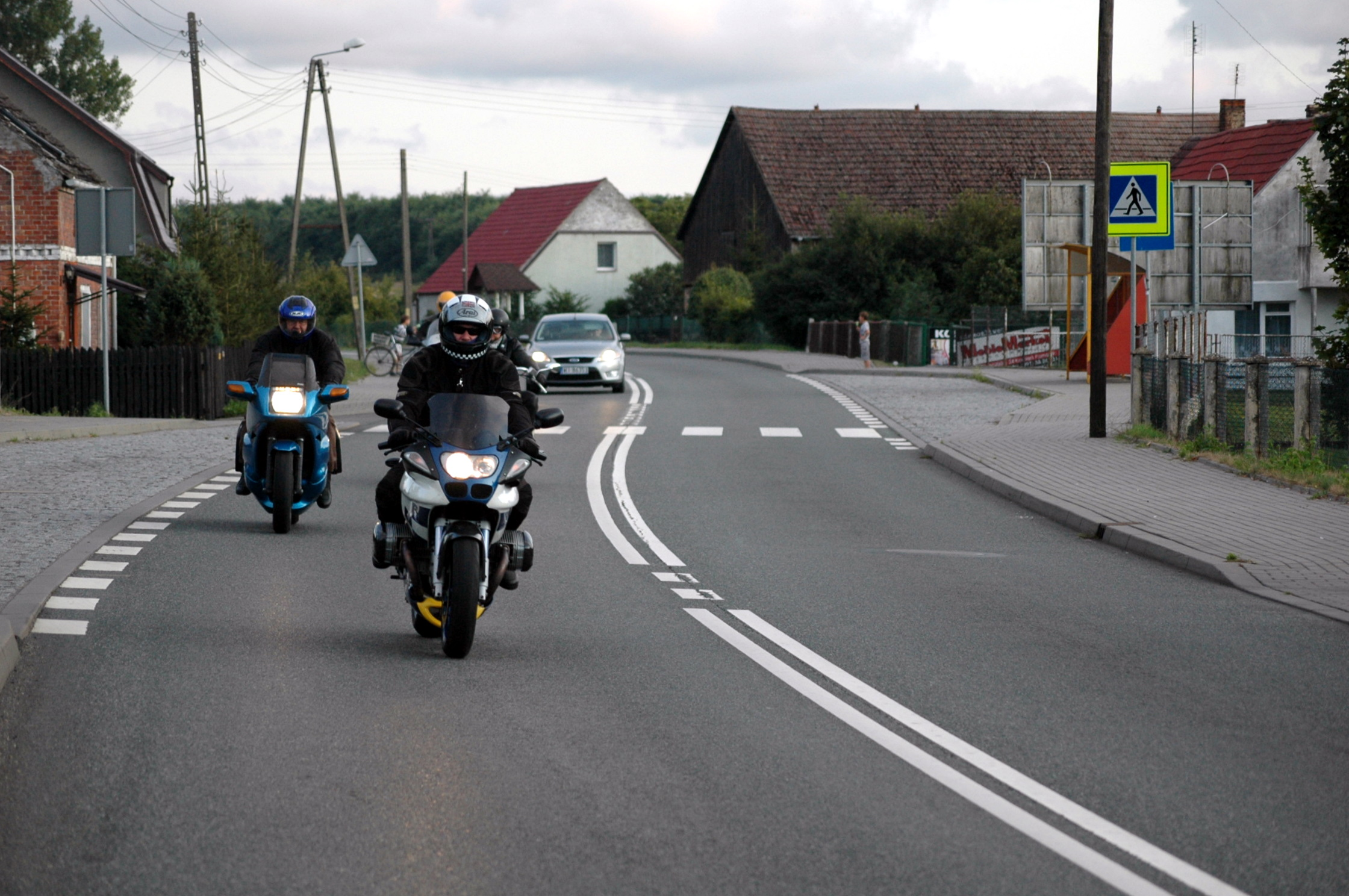 DK3 w Ostromicach